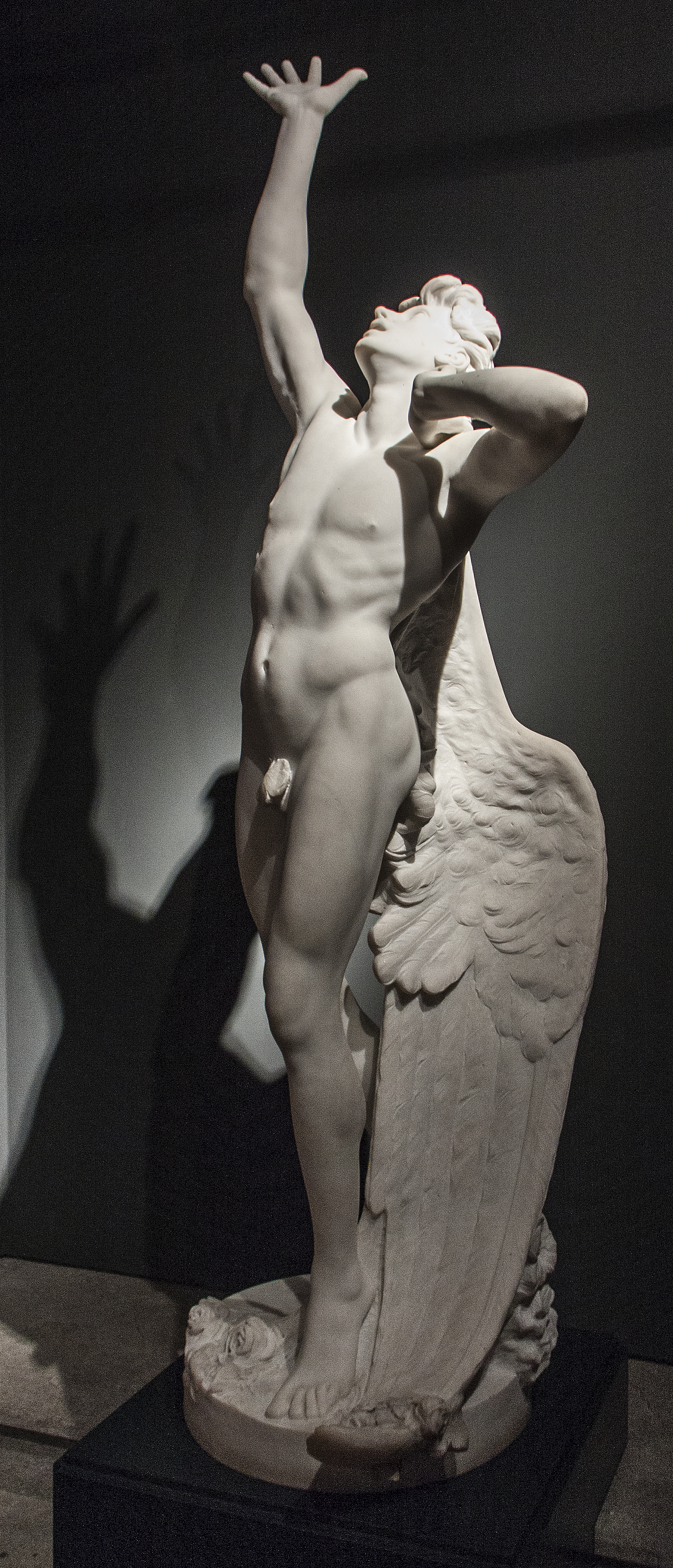 L'angelo di Moore - Domenico Delisi Dal modello di Benedetto Delisi, Marmo (1925)